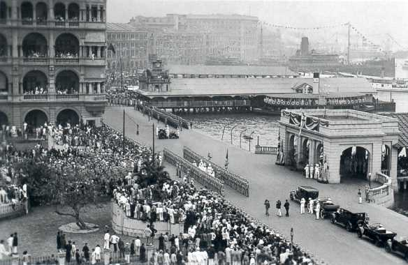 皇后碼頭 Queen's Pier (right), Cecil Clementi's inauguration in 1925